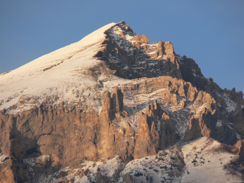 Cima del monte Seguret. Fotografia di Emanuele.